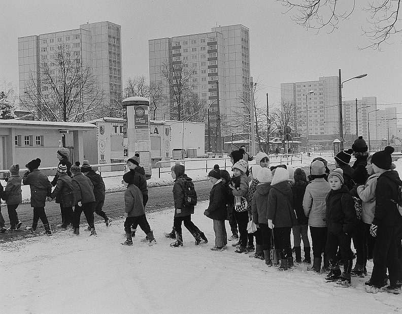 Original image description from the Deutsche Fotothek Dresden. Südseite der Grunaer Straße und Kindergruppe